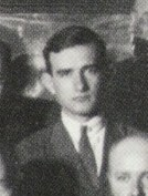 Erste Konferenz der OSA, 1928.